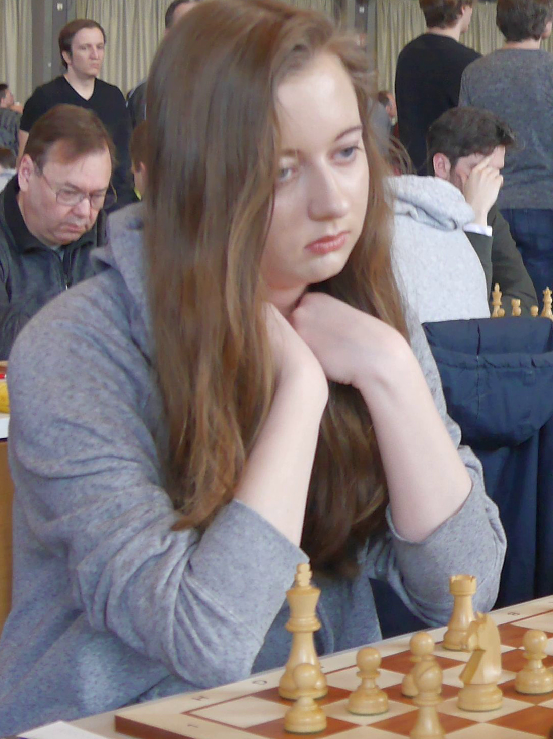 Alexandra Obolentseva, Grenke Chess Open 2018 in Karlsruhe.